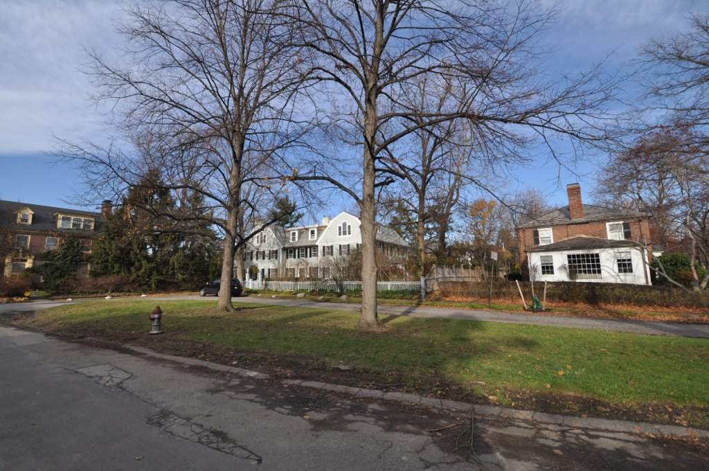 Gray Gardens West in Cambridge, Massachusetts.